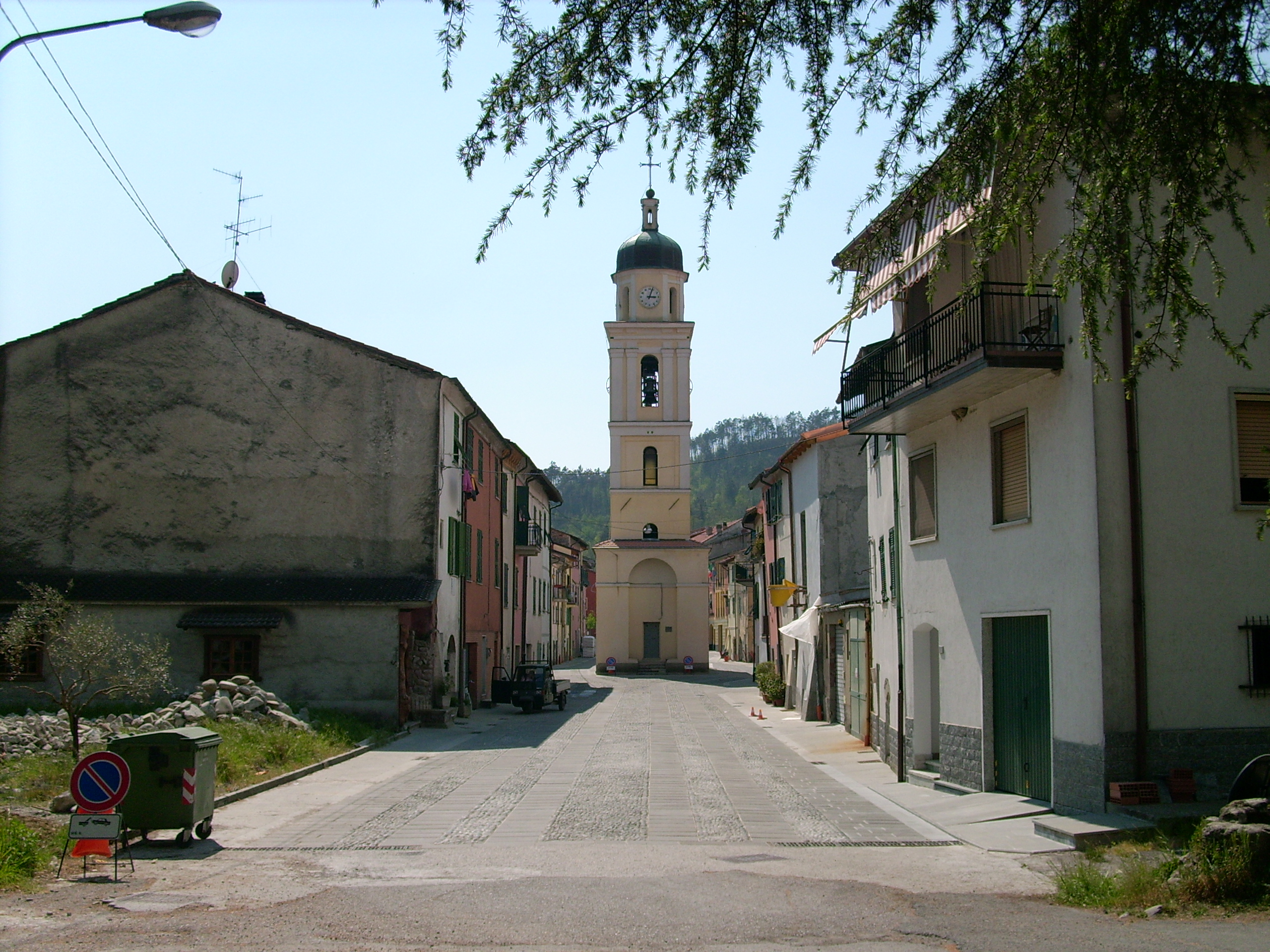 Campanile di Borghetto di Vara, Liguria, Italia